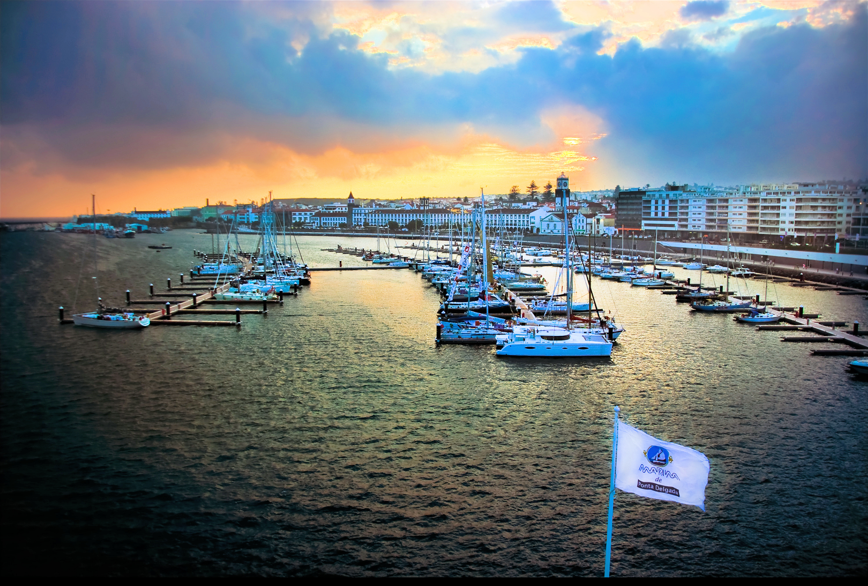 Ponta Delgada, S. Miguel Island, Azores, Portugal. HDR photo.